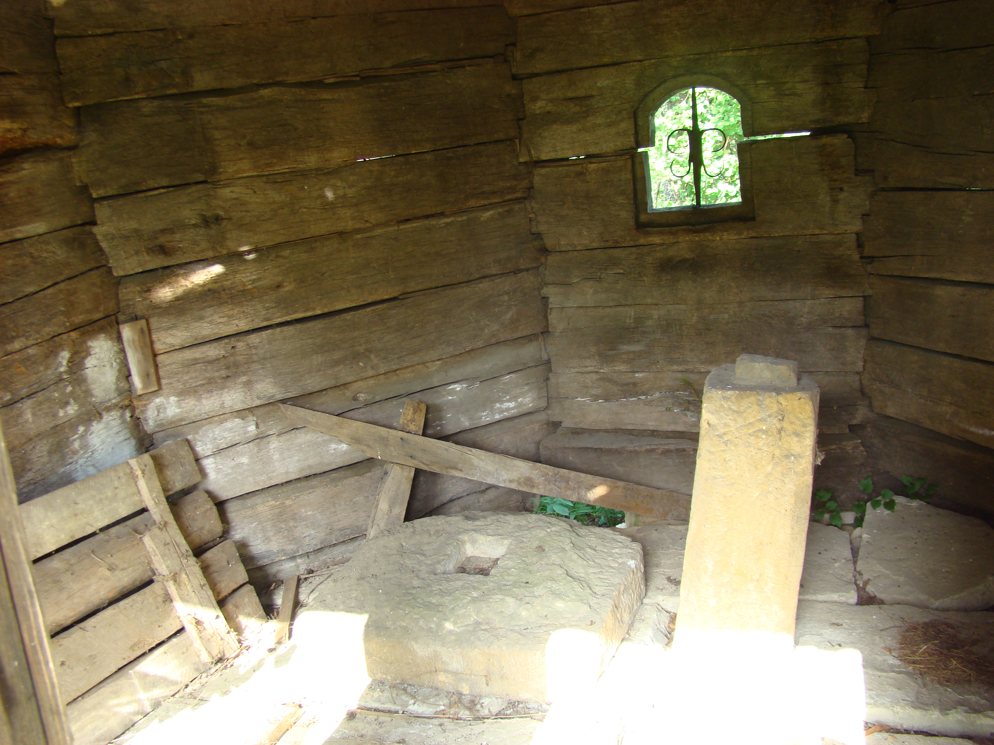 Absida bisericii de lemn "Sf. Arhangheli Mihail şi Gavril" , sat aparţinător CUFOAIA; oraş TÂRGU LĂPUŞ